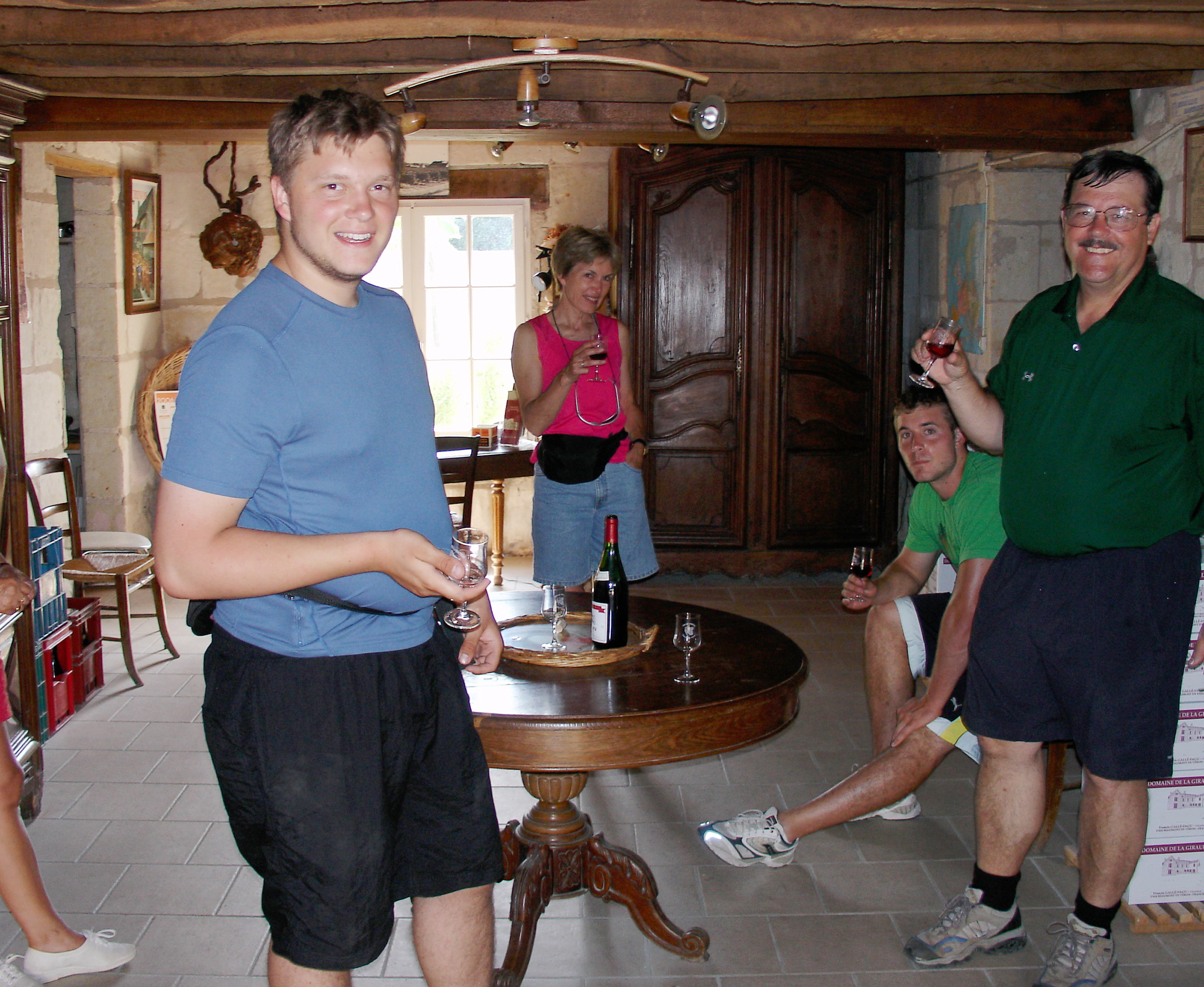 IGP Val-de-Loire, un vin à boire en famille